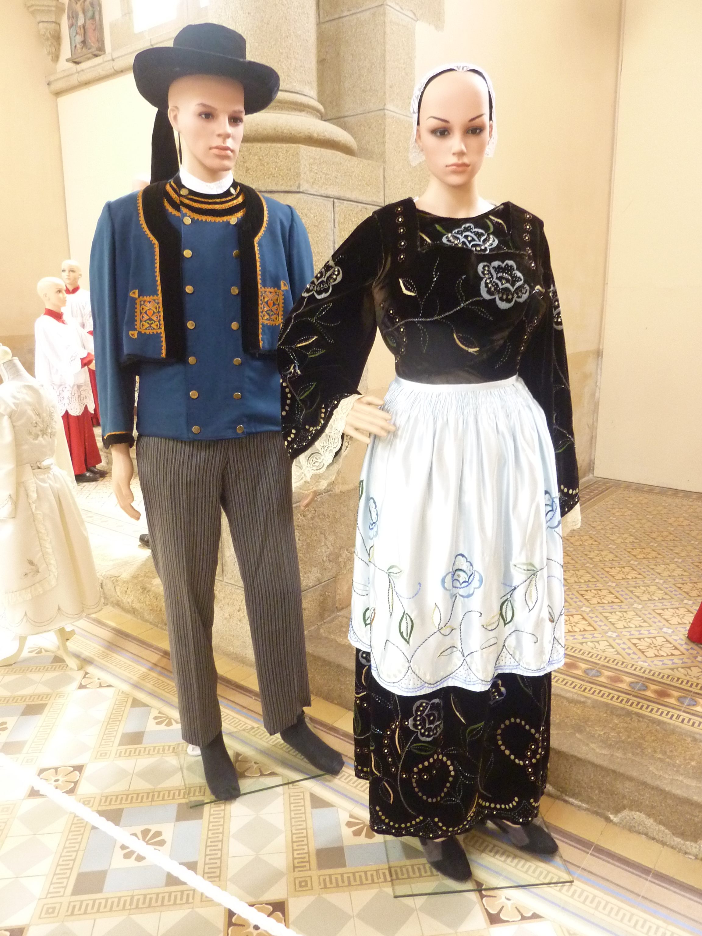 Costumes traditionnels du Cap Sizun (exposition chapelle Saint-Vincent à Pont-Croix en 2017)